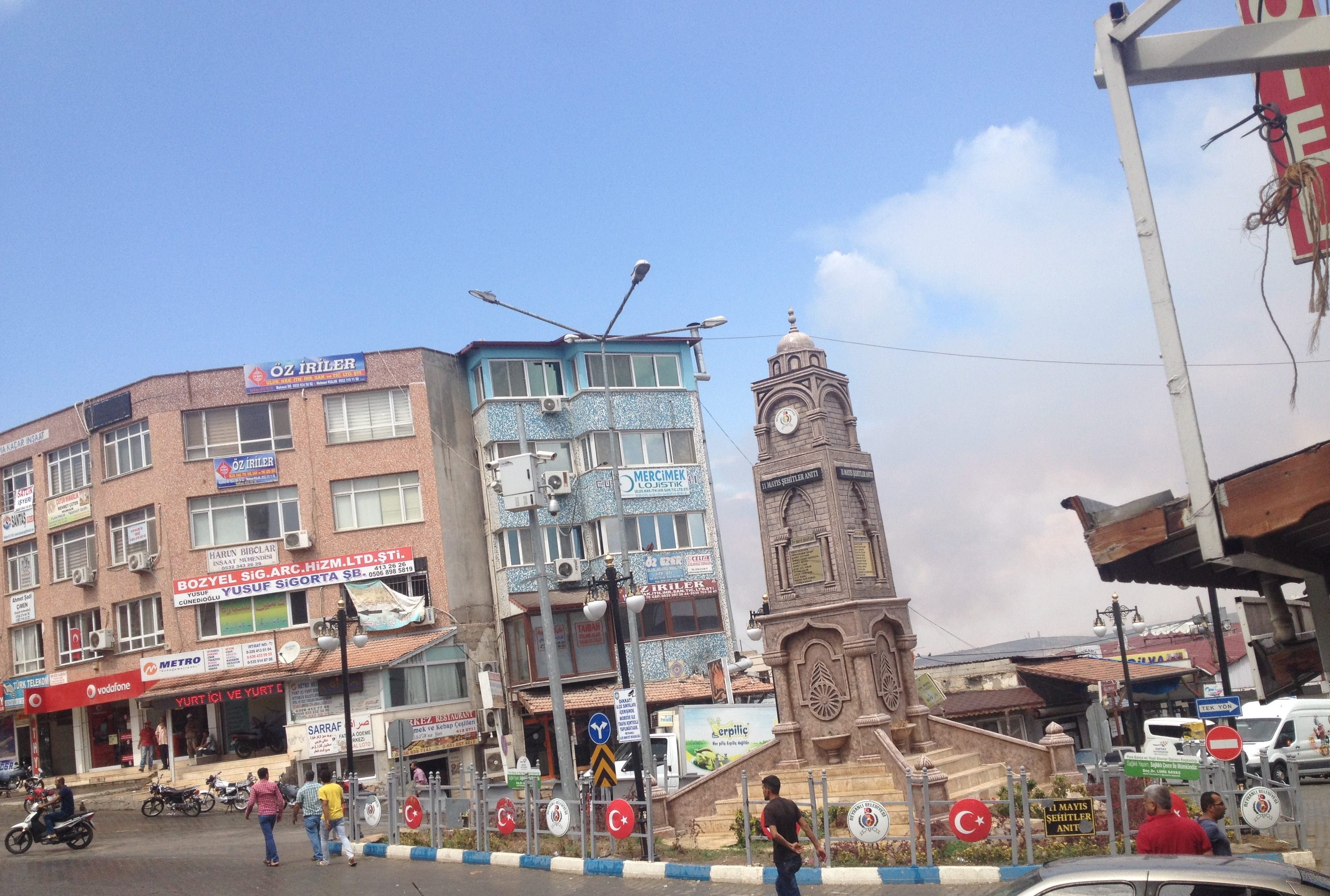 Reyhanlı centre ville